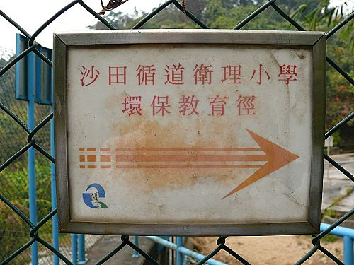 中文（香港）: 環保教育徑